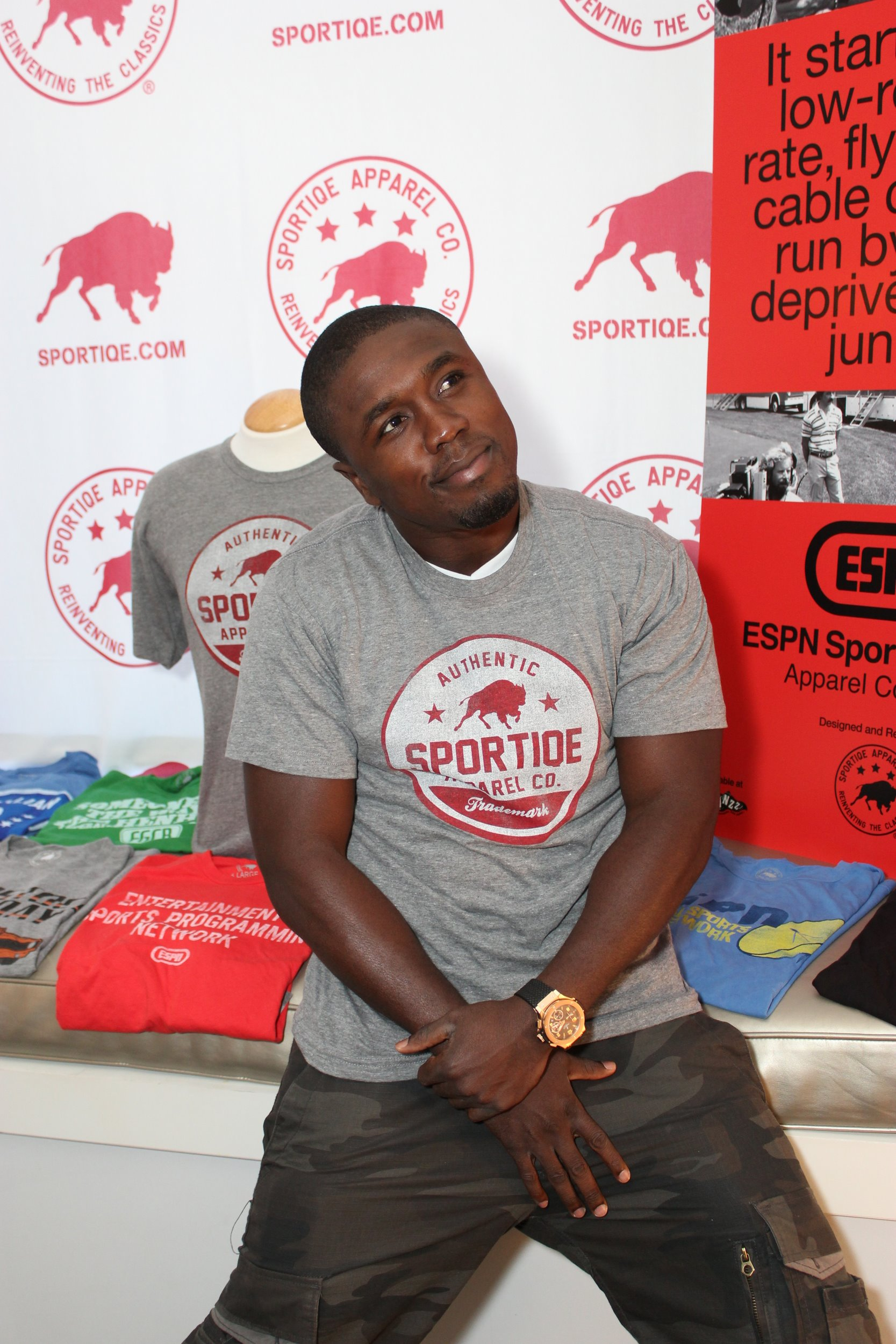 Andre Berto, Boxer